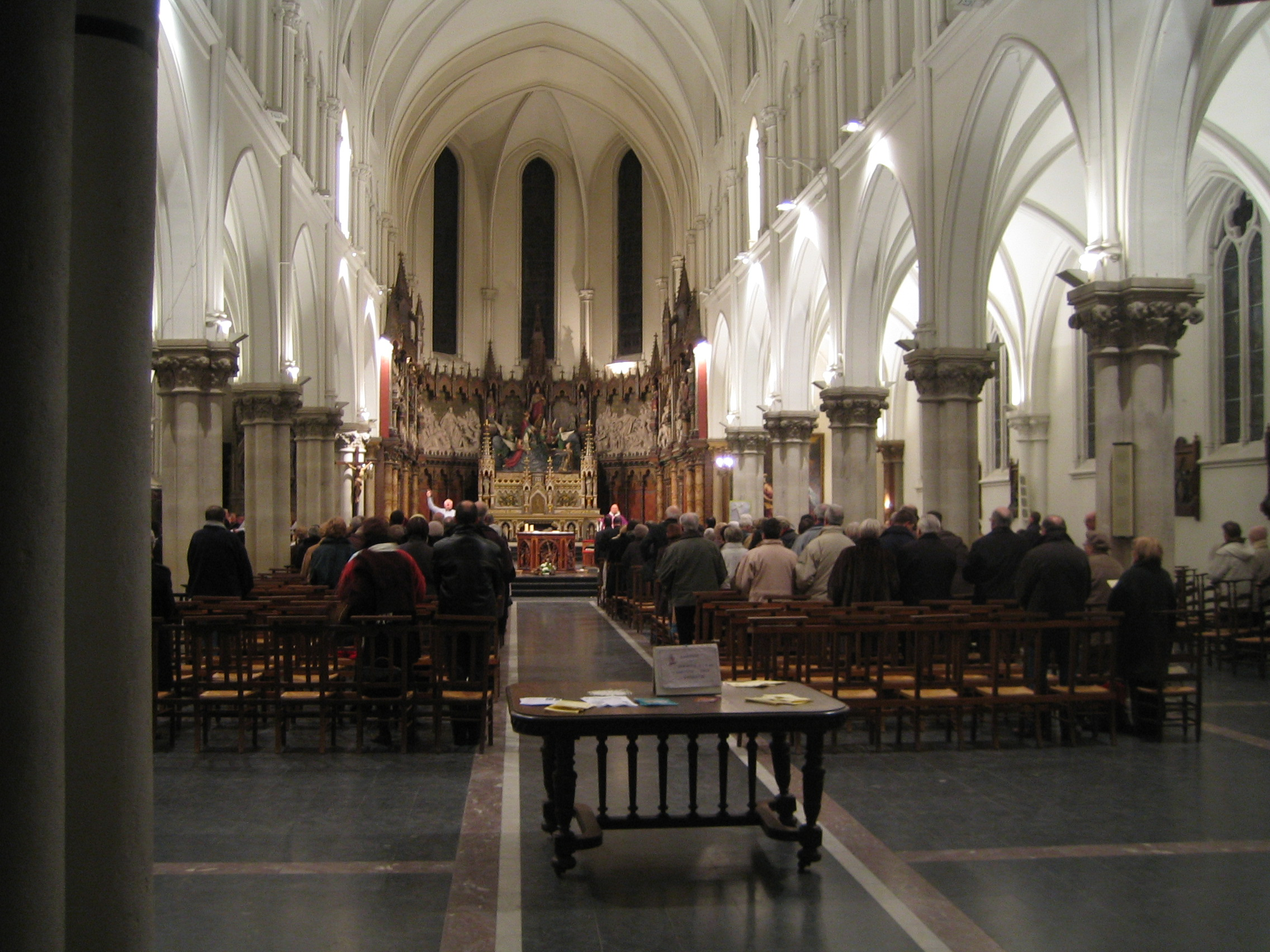 Intérieur de l'église Saint-Nicolas, Wasquehal.